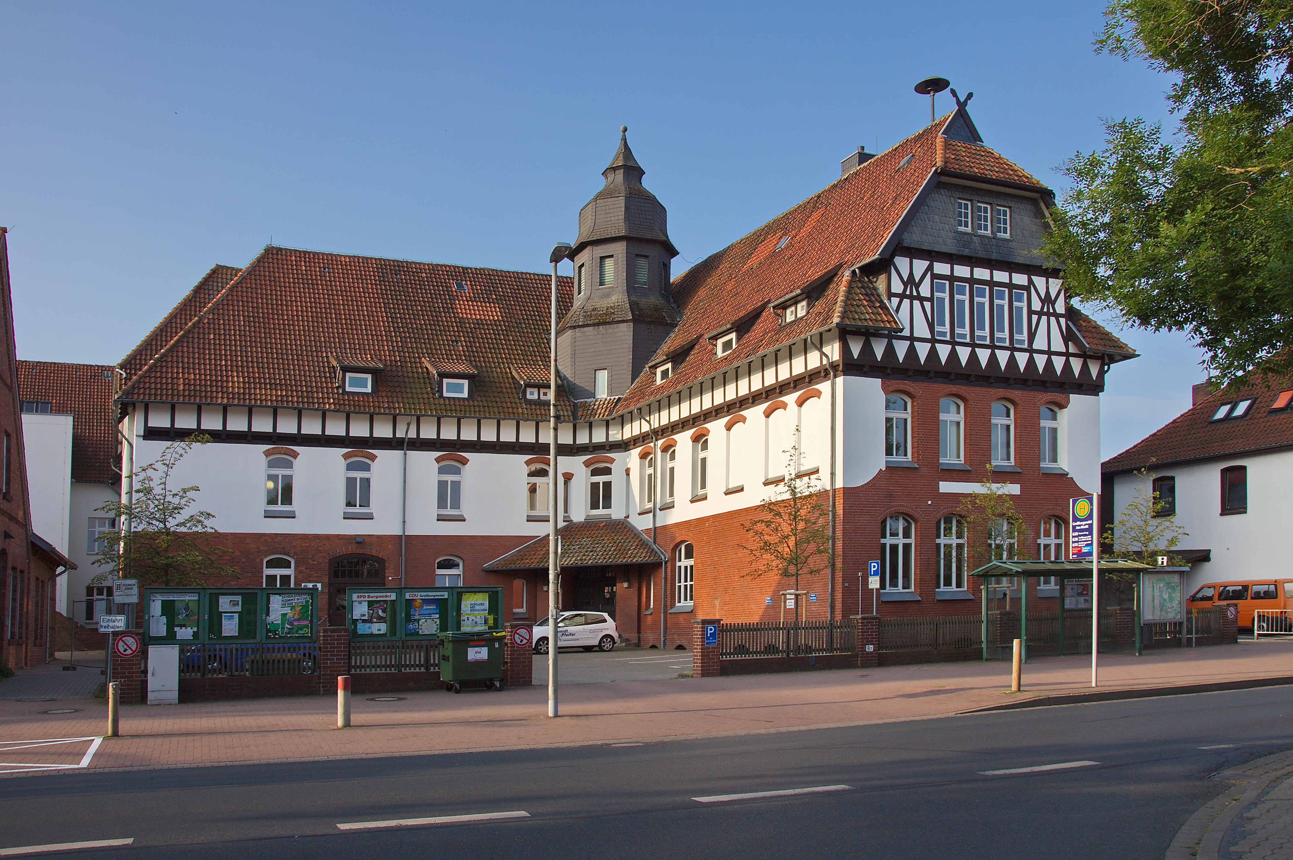 Baudenkmal Alte Schule Im Mitteldorf 13 in Großburgwedel (Burgwedel)